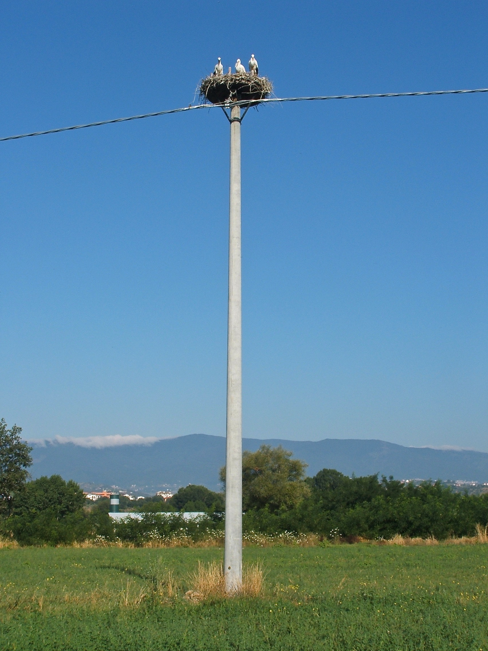 Licenza